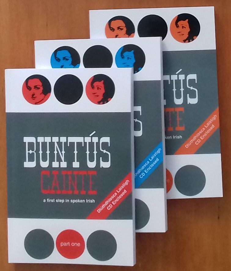 Grianghraf de na trí leabhar sa tsraith Buntús Cainte